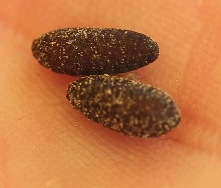 Kokons bzw. Puppen von Buquetia musca am 4. August 2020